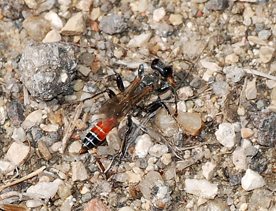 A digger wasp (Prionyx kirbii)